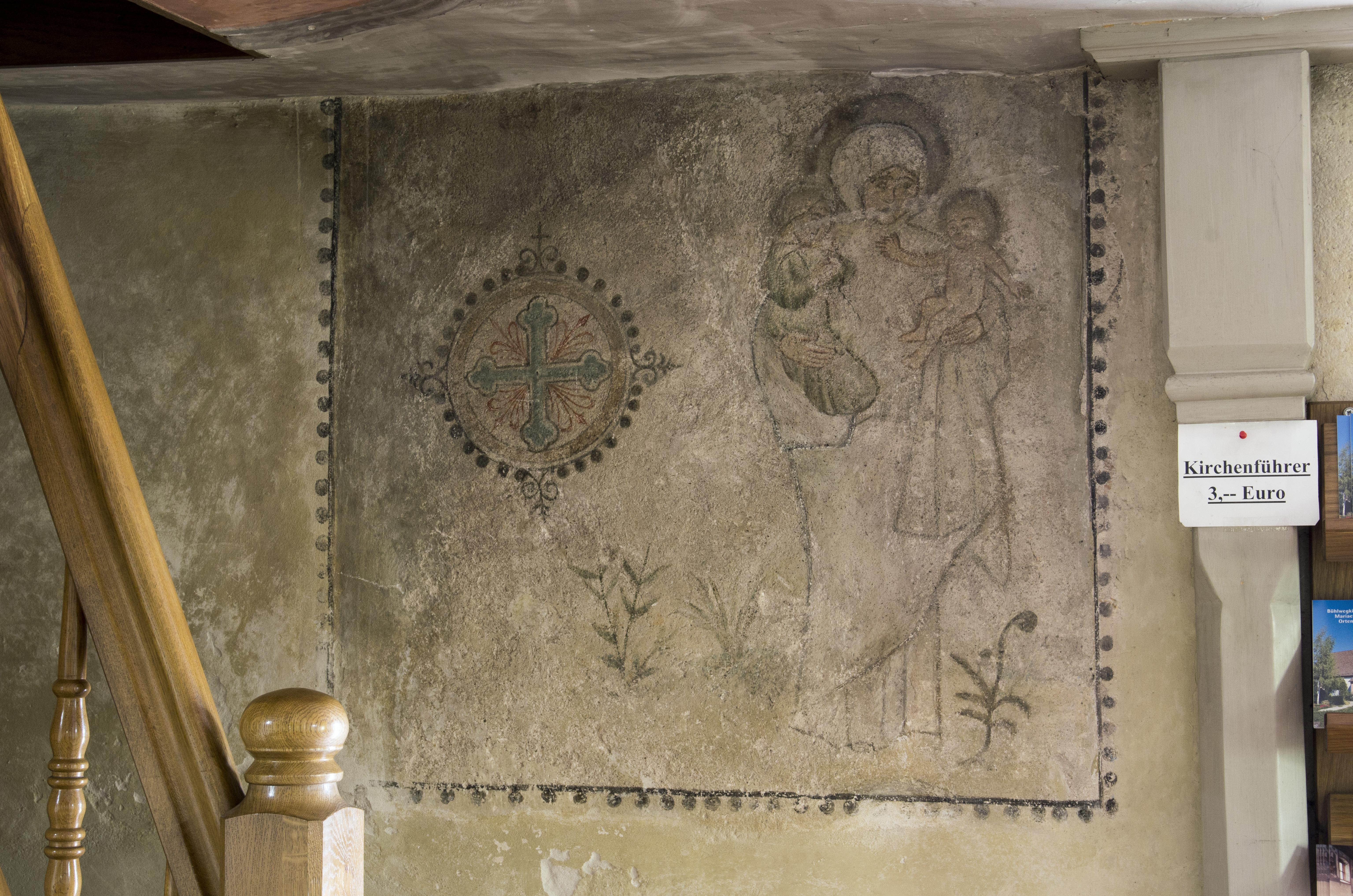 Bilder von der Bühlwegkapelle in Ortenberg